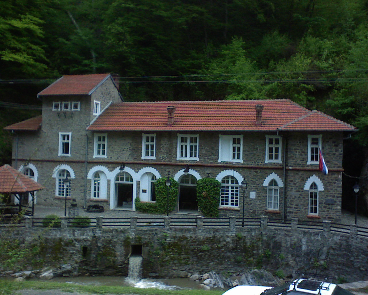 Hidroelektrana Vučje